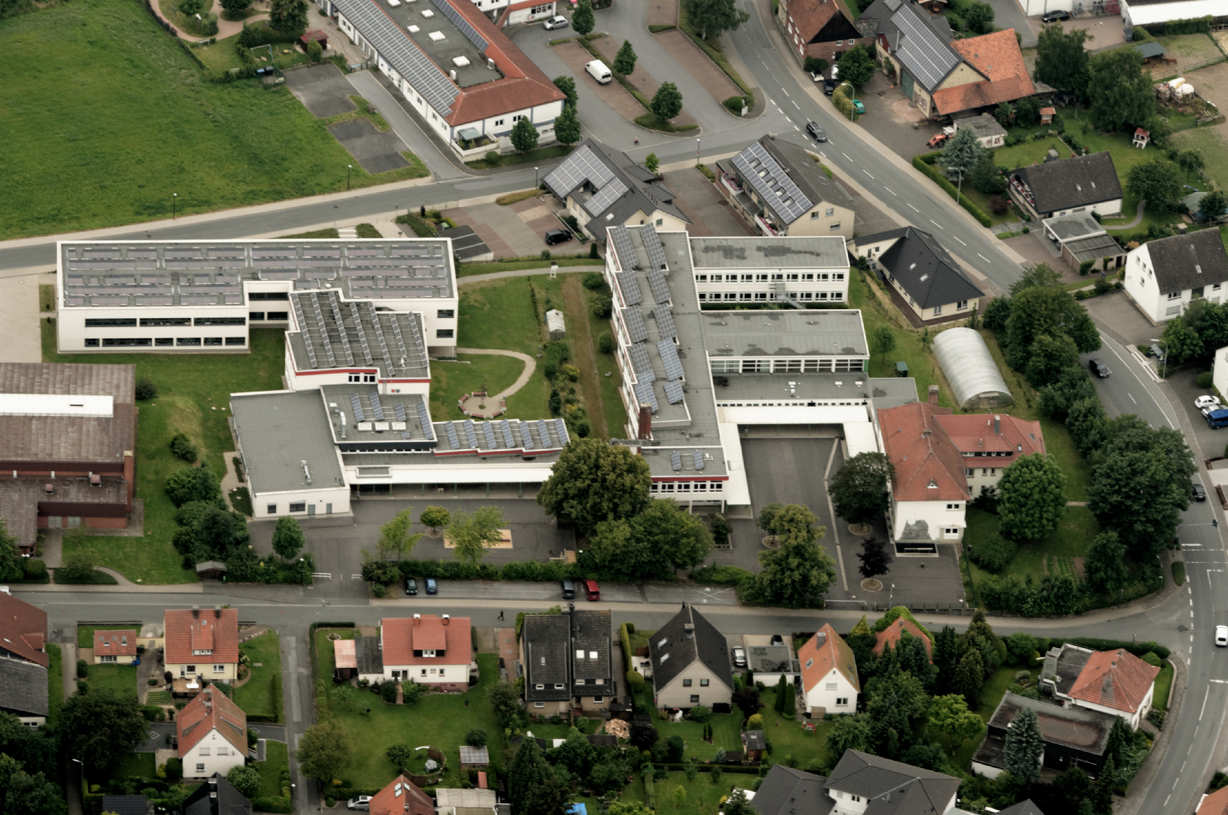 Fotoflug Sauerland Nord. Ense-Bremen, Conrad-von-Ense-Schule, Bundesstraße 516, Blickrichtung West The making of this document was supported by the Community-Budget of Wikimedia Germany.